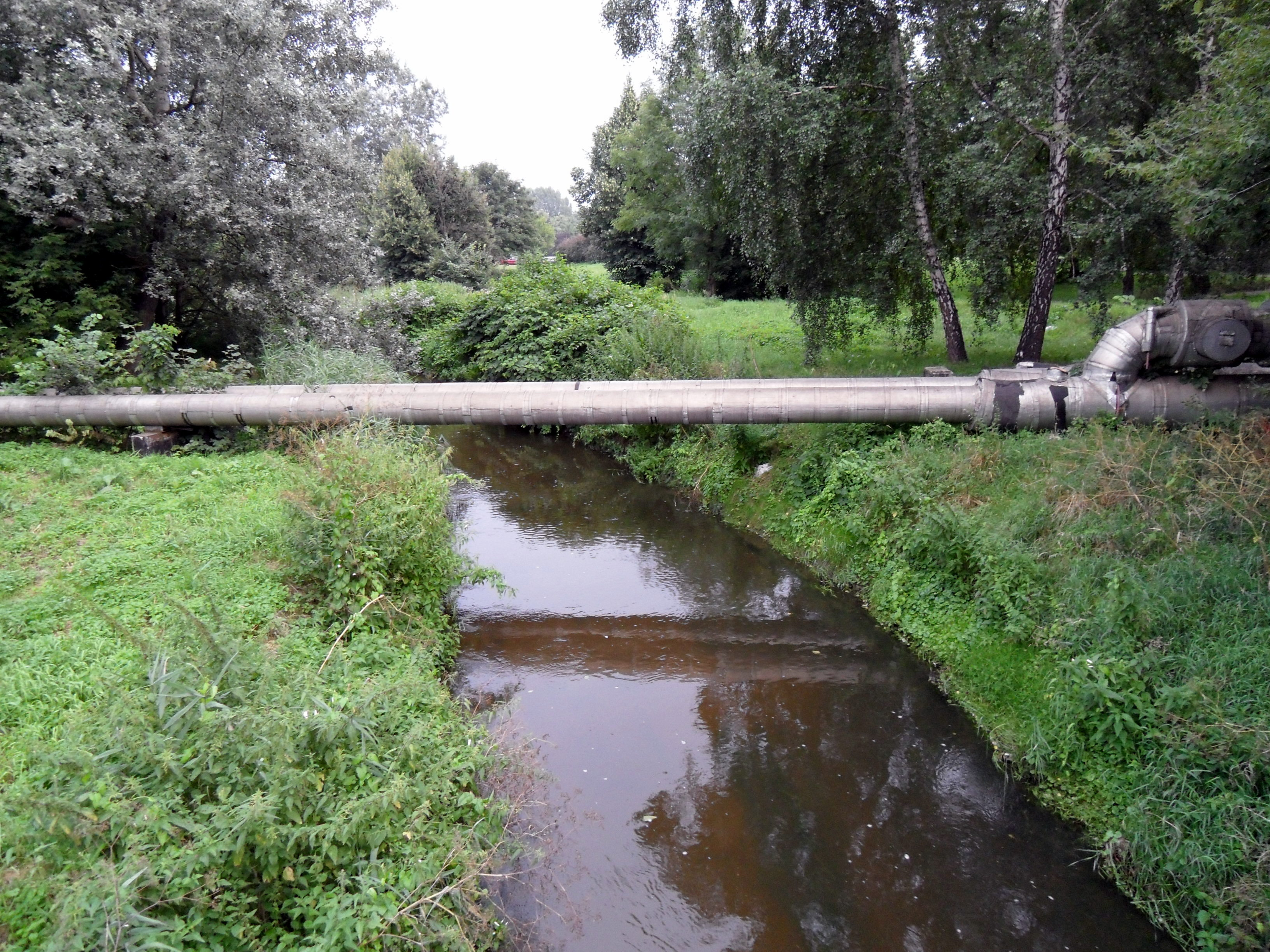 Utrata w Pruszkowie w okolicy torów kolejowych